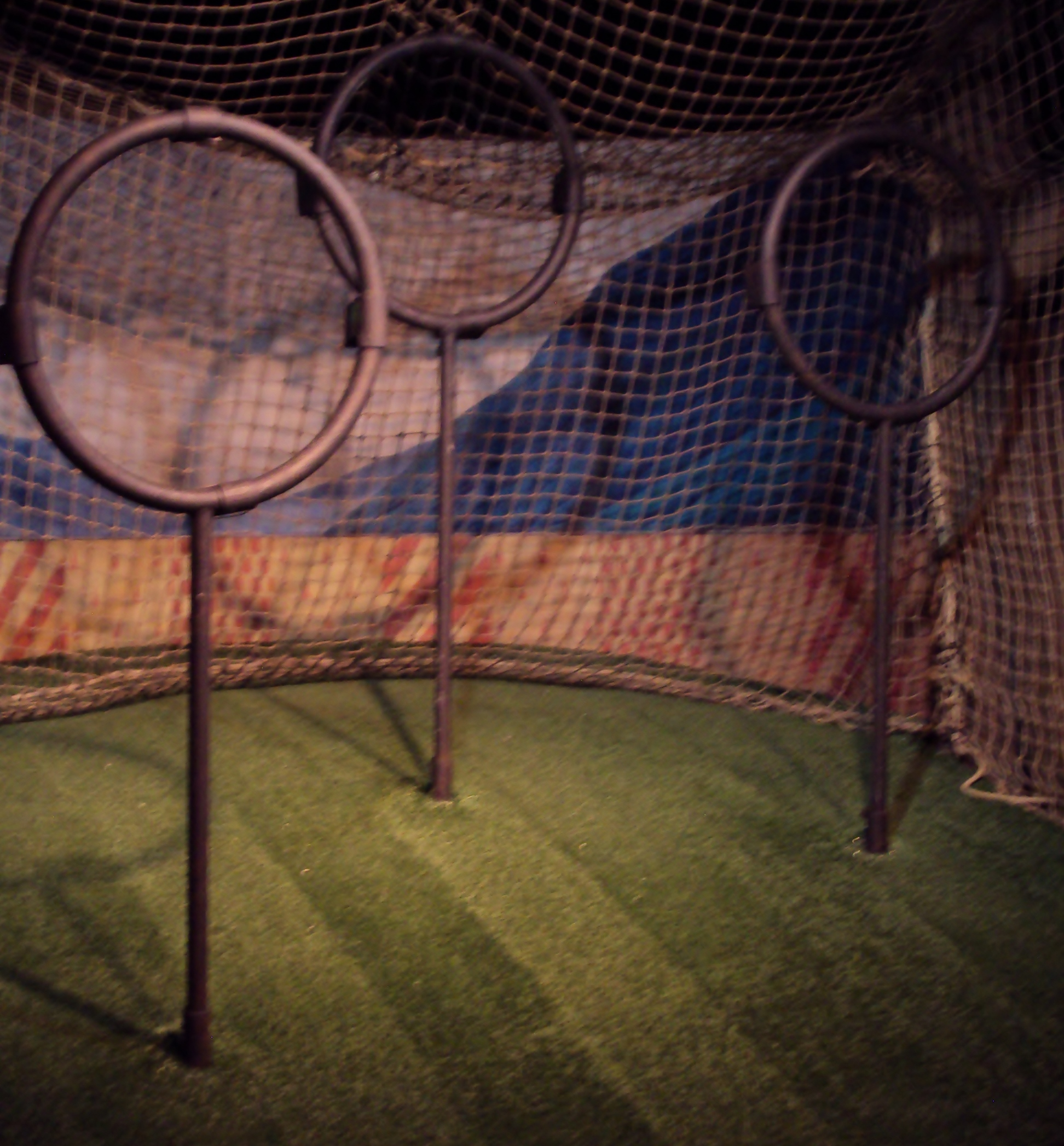 Zwerkbalveld (Engels: Quidditch pitch) tijdens Harry Potter: The Exhibition in Brussel (België)